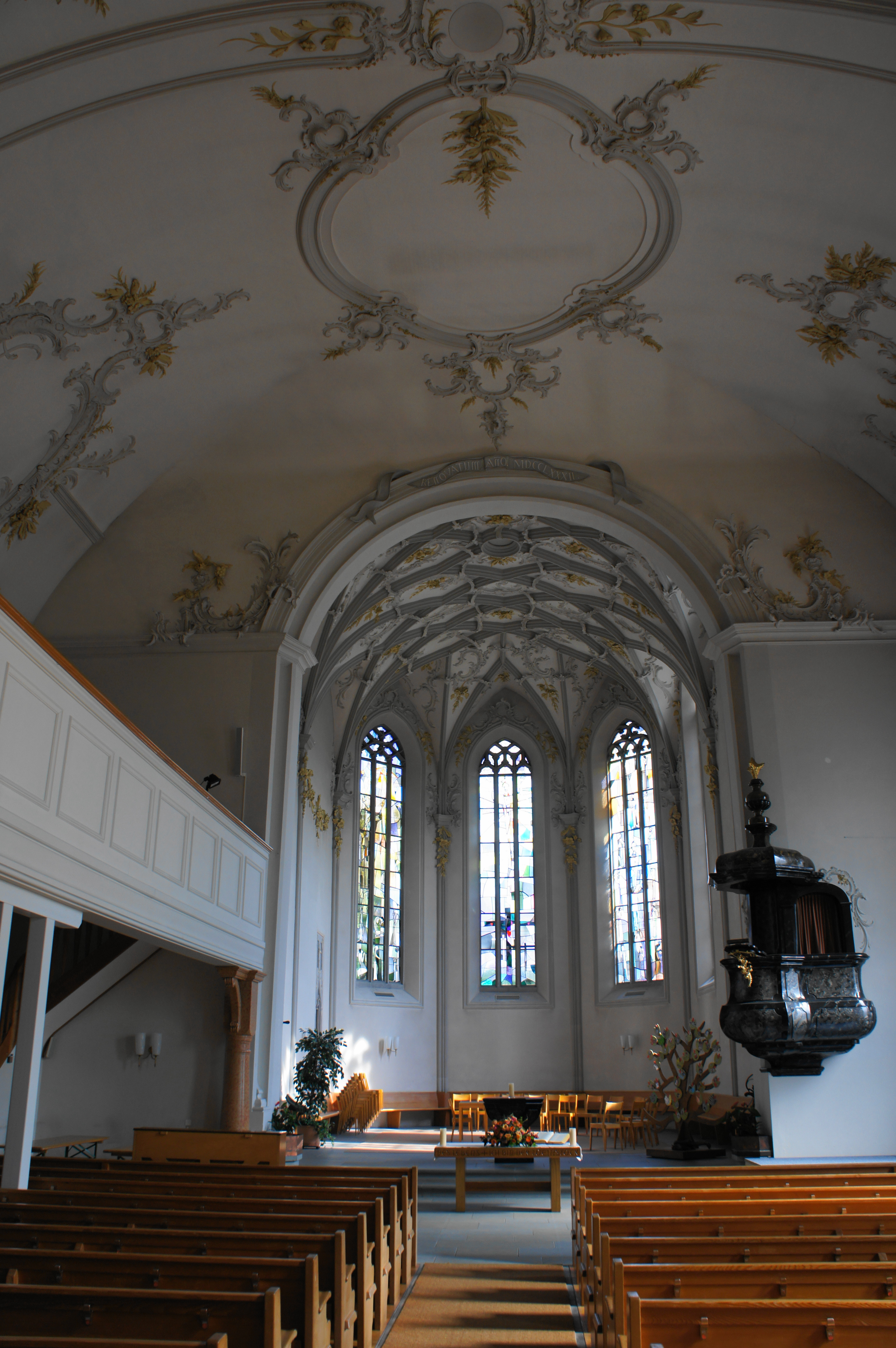 Blick vom Eingang her Richtung Osten in der ref. Kirche in Herisau. Links erstreckt sich ein Teil der Empore bis zum Chorraum. Rechts vom Chorraum ist eine Kanzel mit verborgenem Zugang. An der Decke sind Stuckaturen zu erkennen.